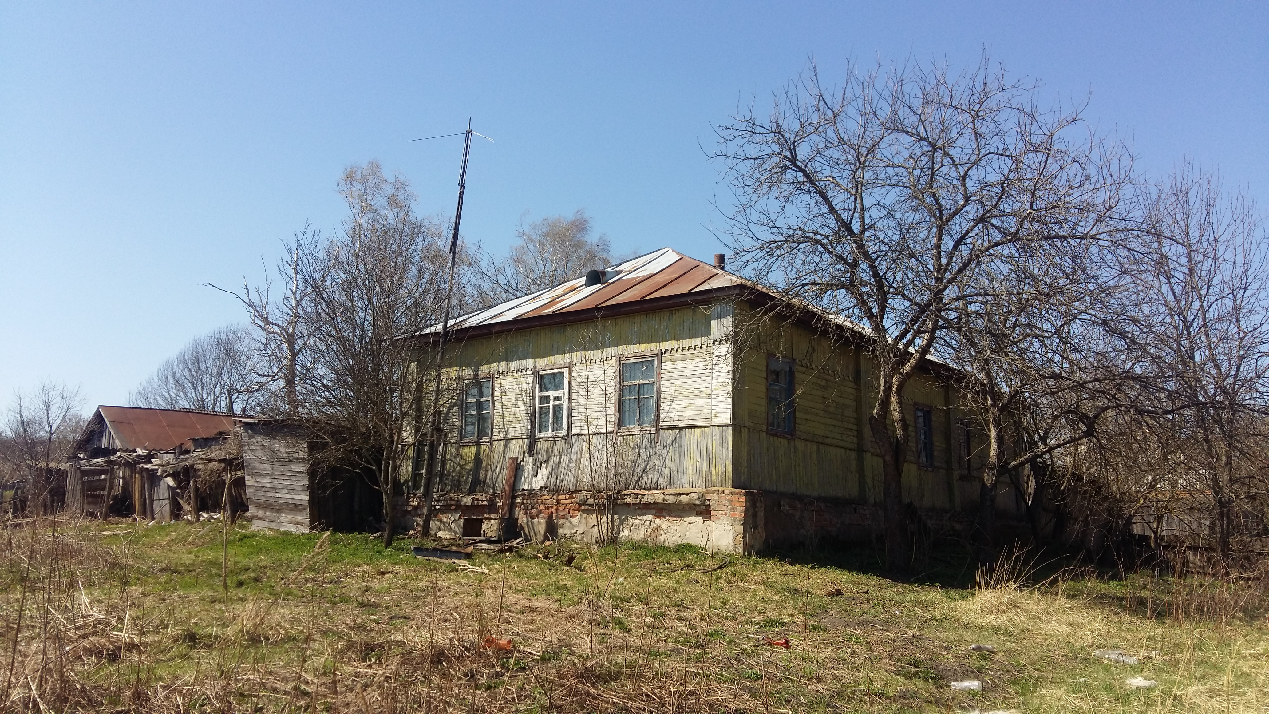 Дом Праведного Николая Степановича в селе Викторово